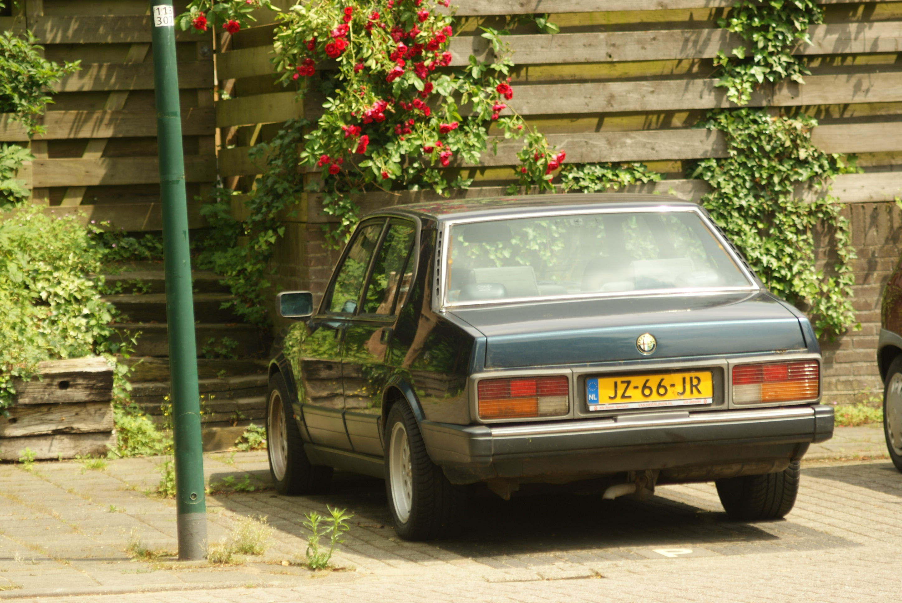 JZ-66-JR